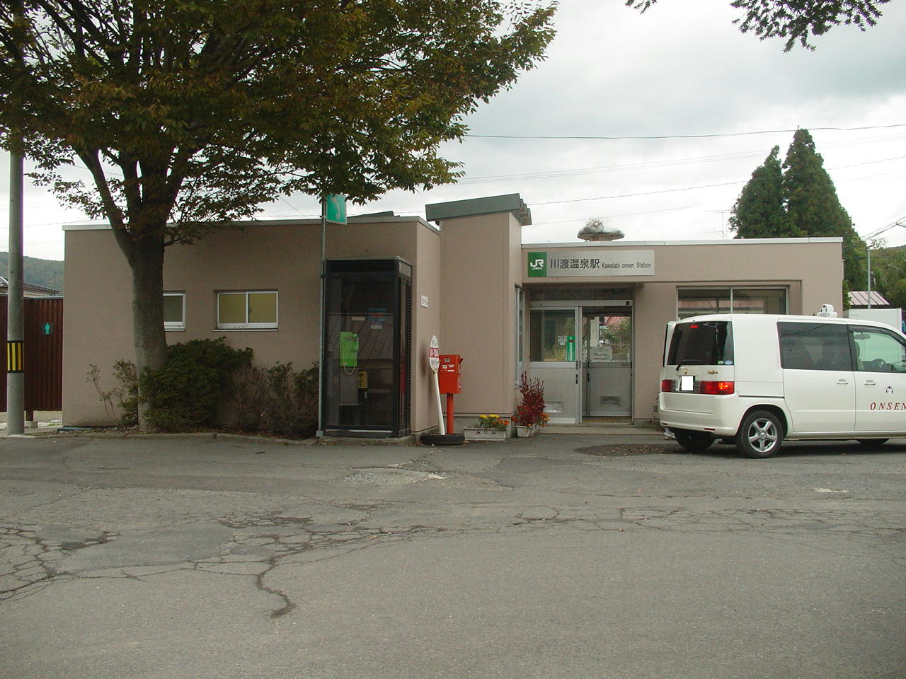 （川渡温泉駅）